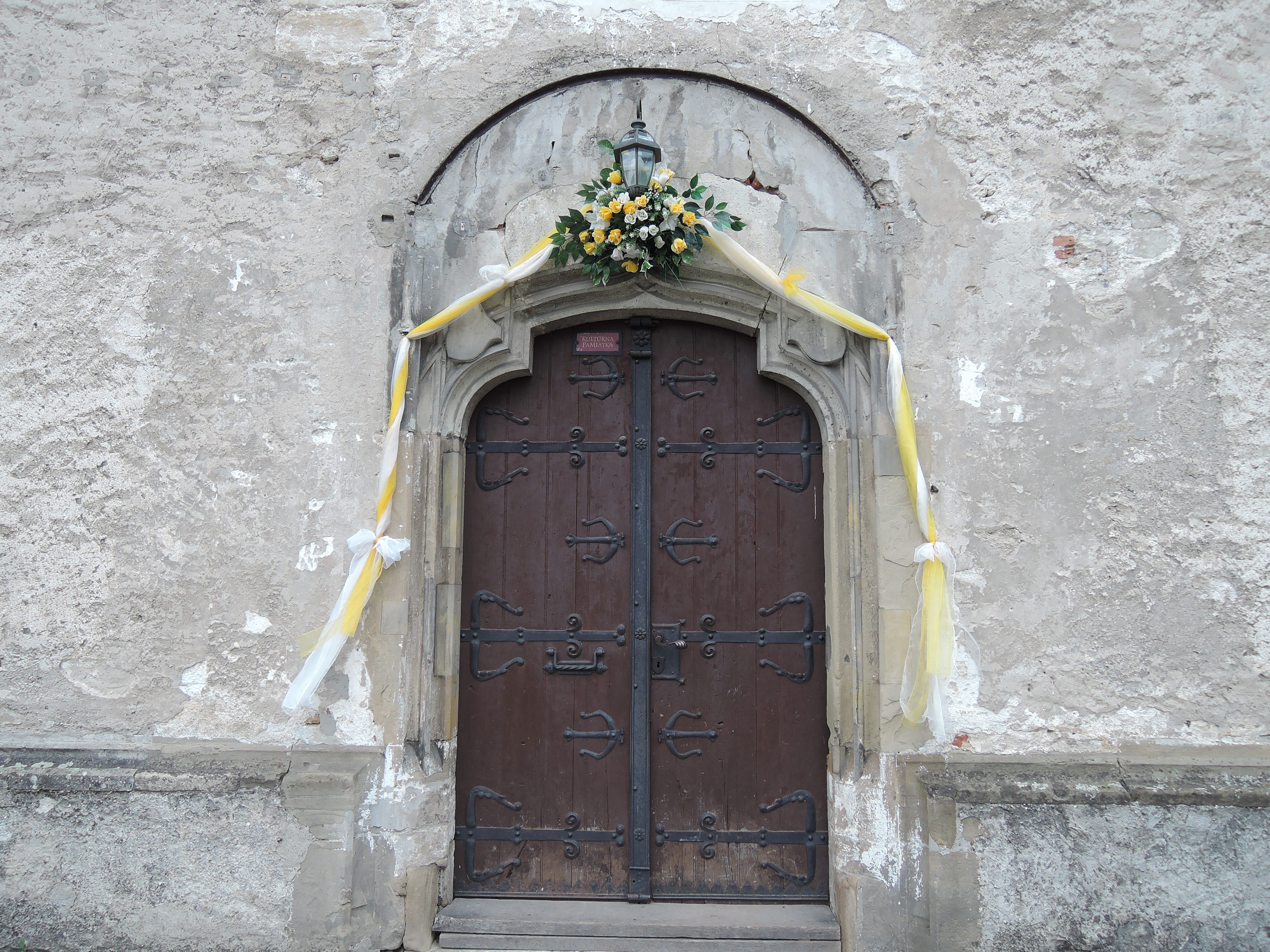 hlavný sedlový portál